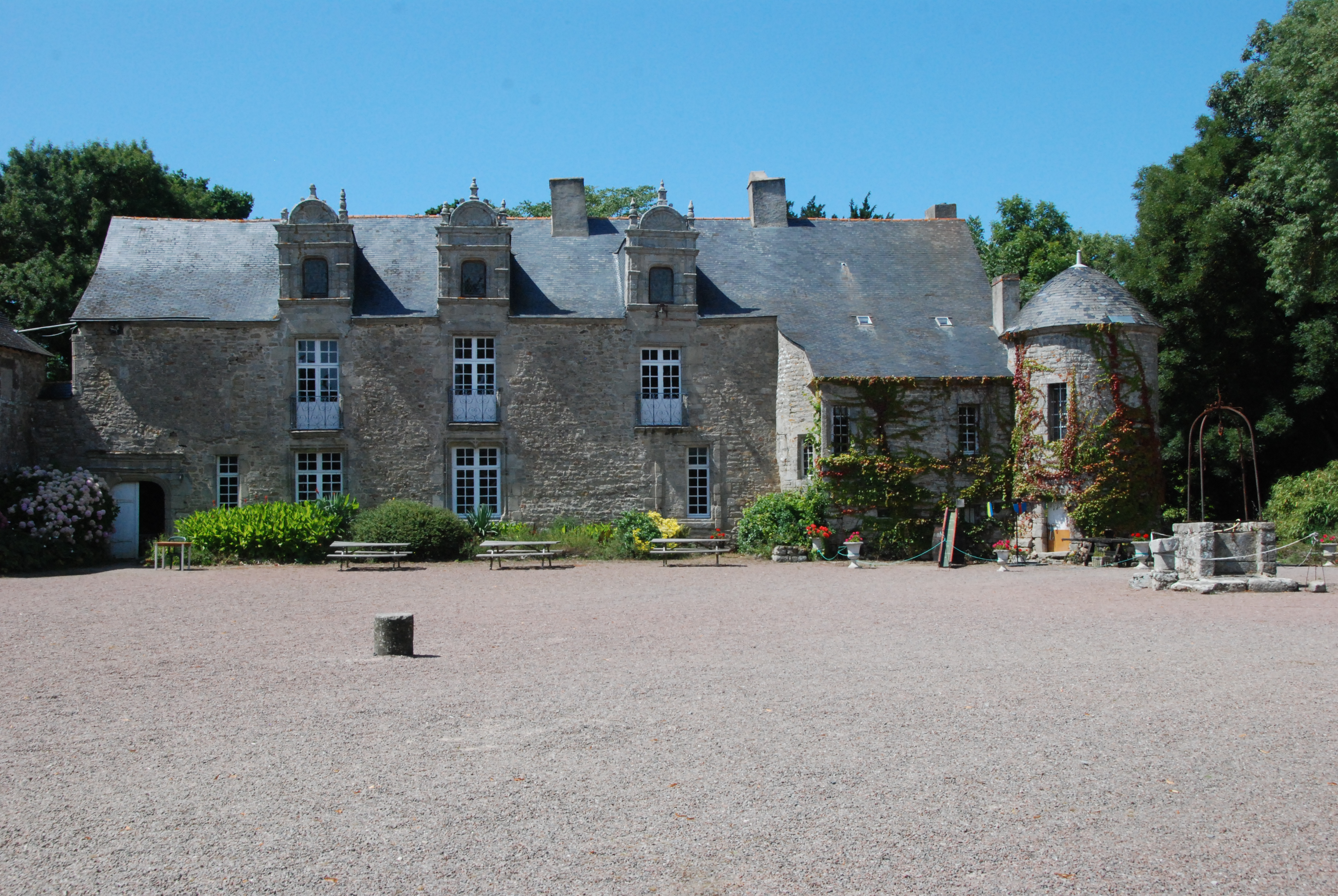 Corps principal du château de Careil, Guérande, Loire-Atlantique